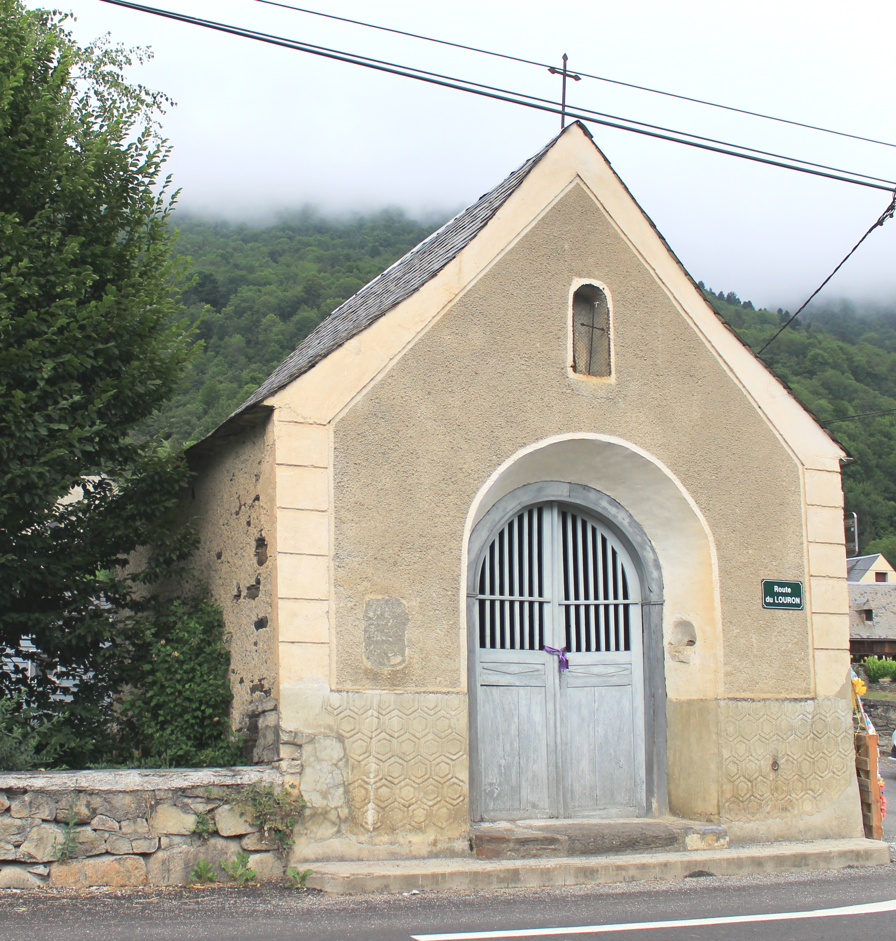 Chapelle Saint-Éloi d'Adervielle (Hautes-Pyrénées)